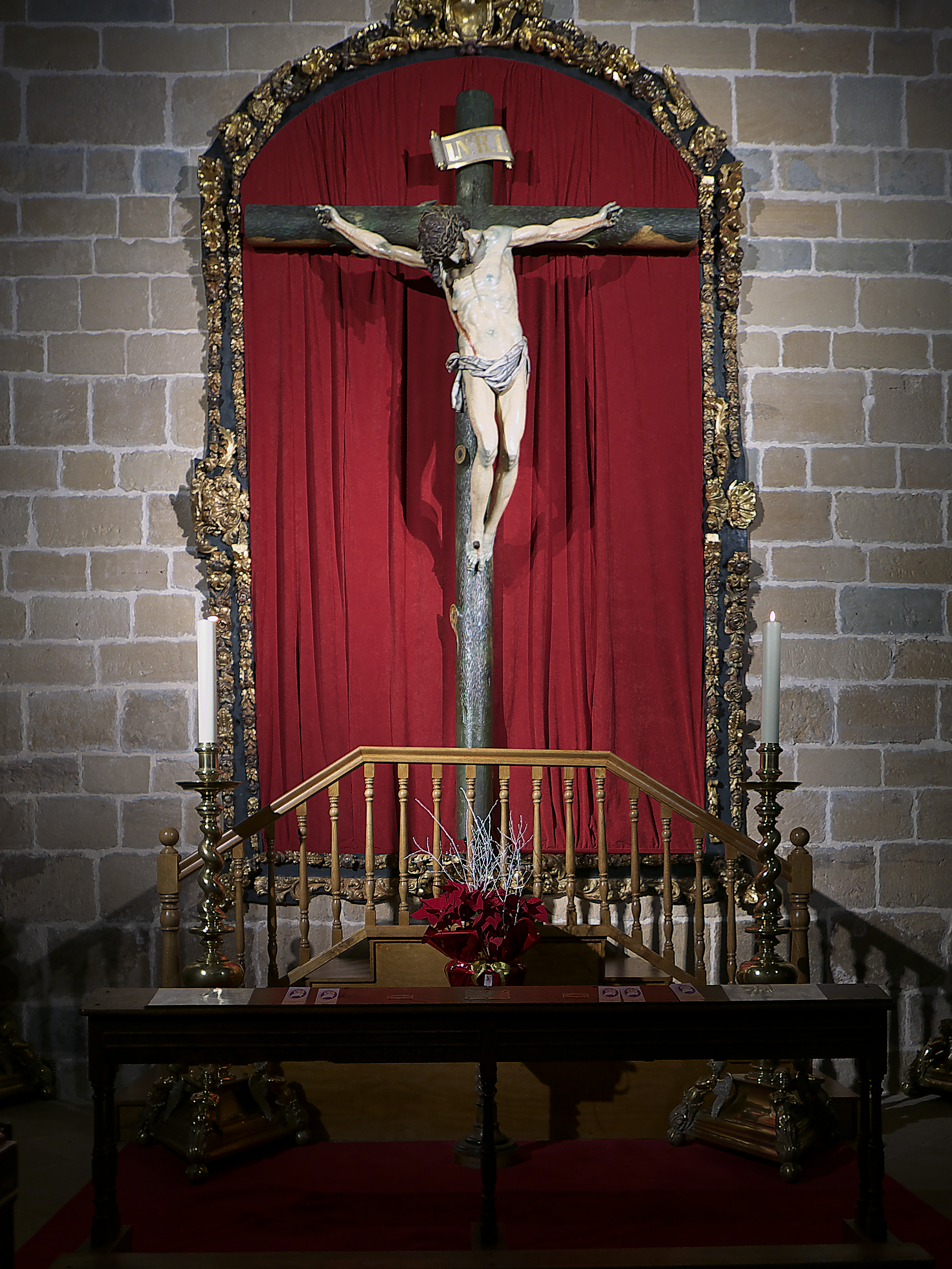 Capilla de San Juan Bautista. Crucificado de Juan de Ancheta (1577)